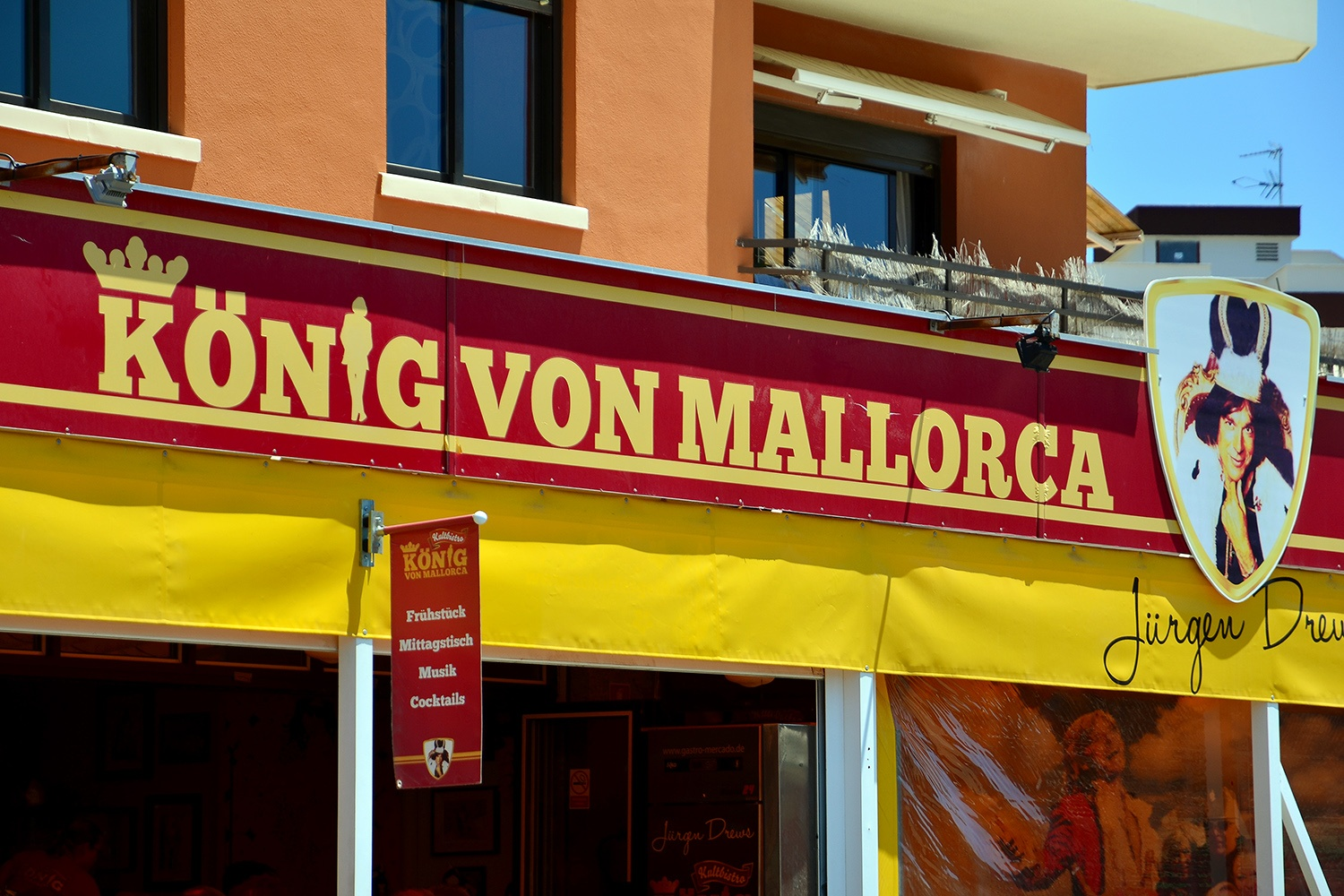 Santa Ponça, Mallorca, Balearen, Spanien, Datum/Uhrzeit: 03.06.2013 13:48:51